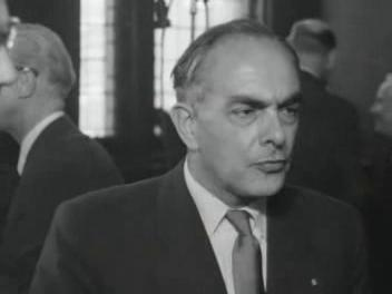 Guillaume Landré